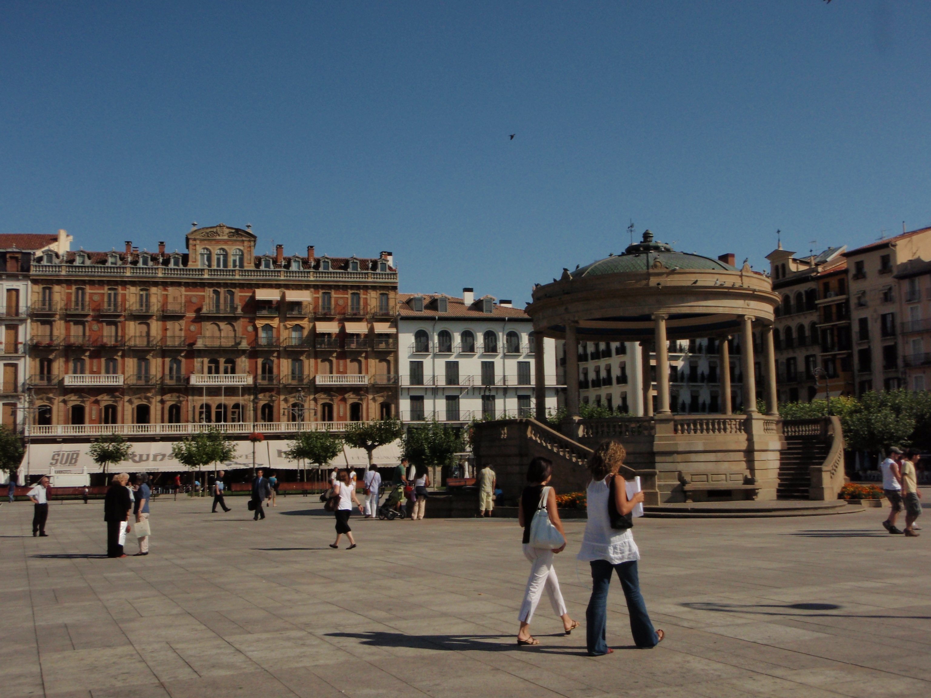 Piazza di Pamplona